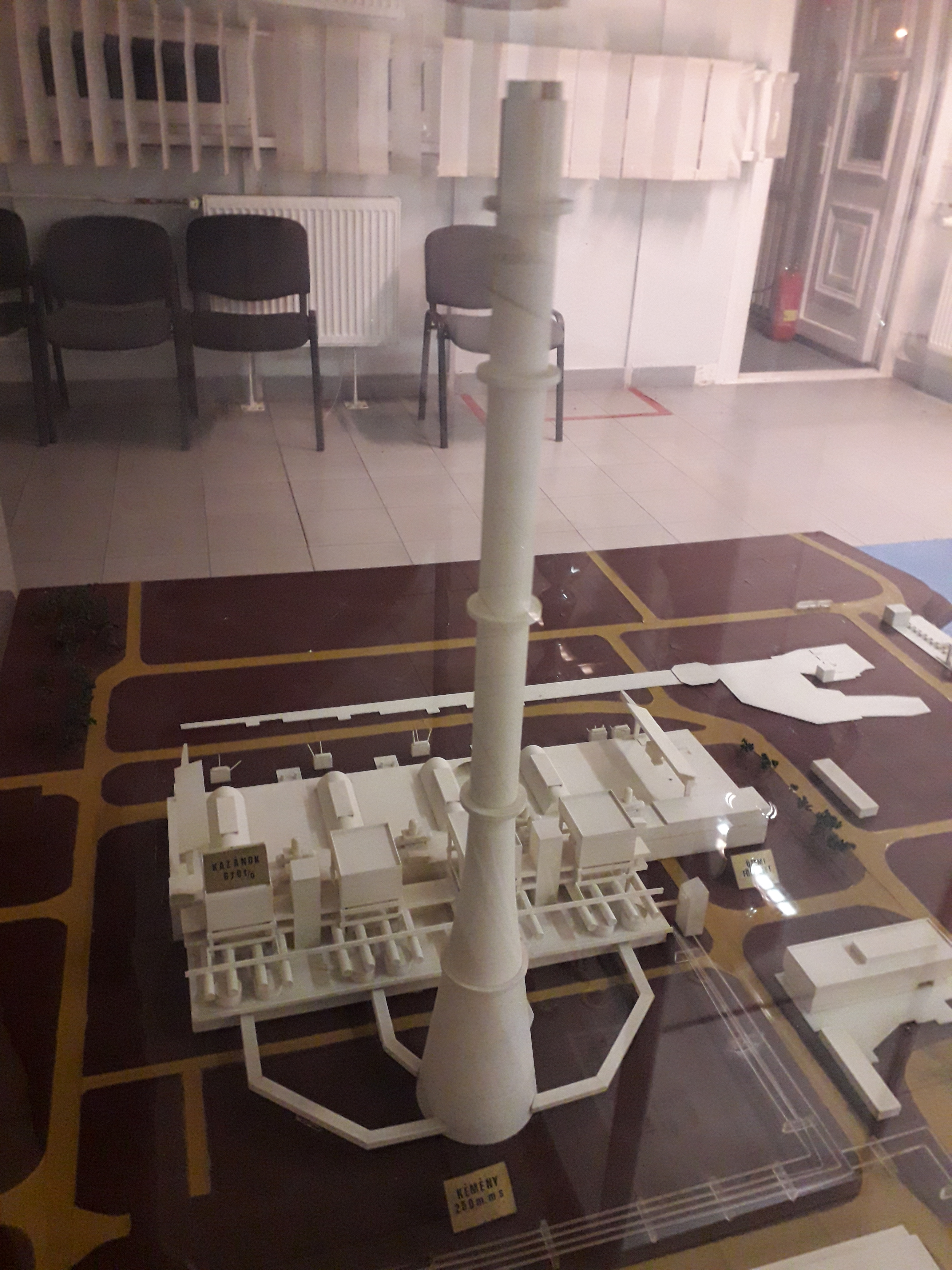 Tisza II hőerőmű modellje a négy blokkal és a kéménnyel